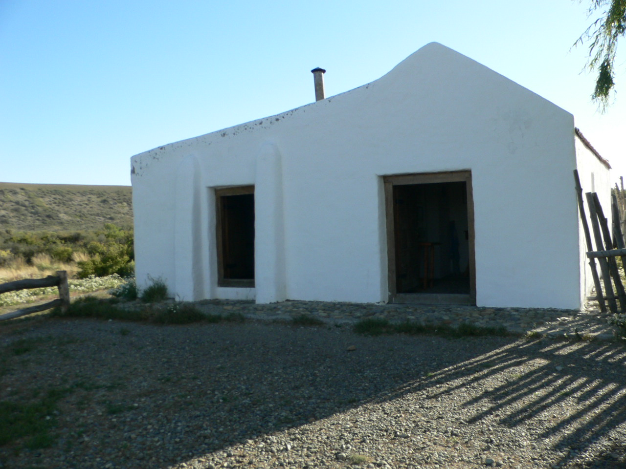 Casa museo del Comandante Luis Piedrabuena, situada en la Isla Pavón.